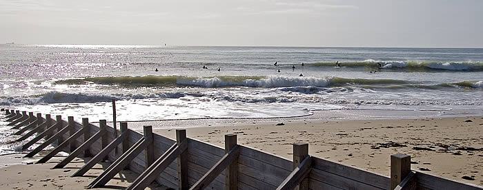 Spot de La Pergola - La Couarde-sur-Mer - île de Ré - Charente-Maritime Photo issue de ma banque d'images : Pep.per 8 octobre 2006 à 00:28 (CEST)